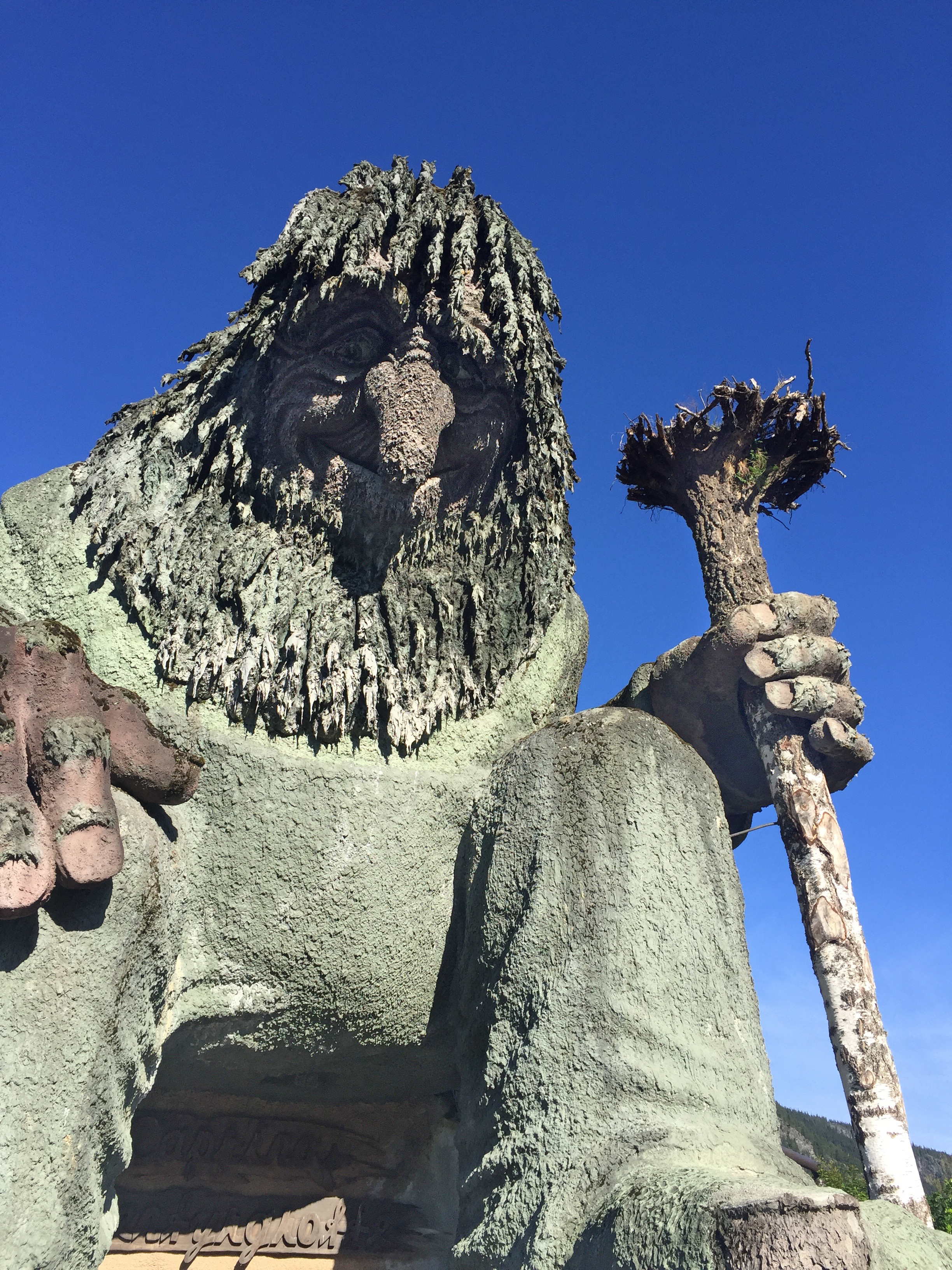 Trollet i Hunderfossen